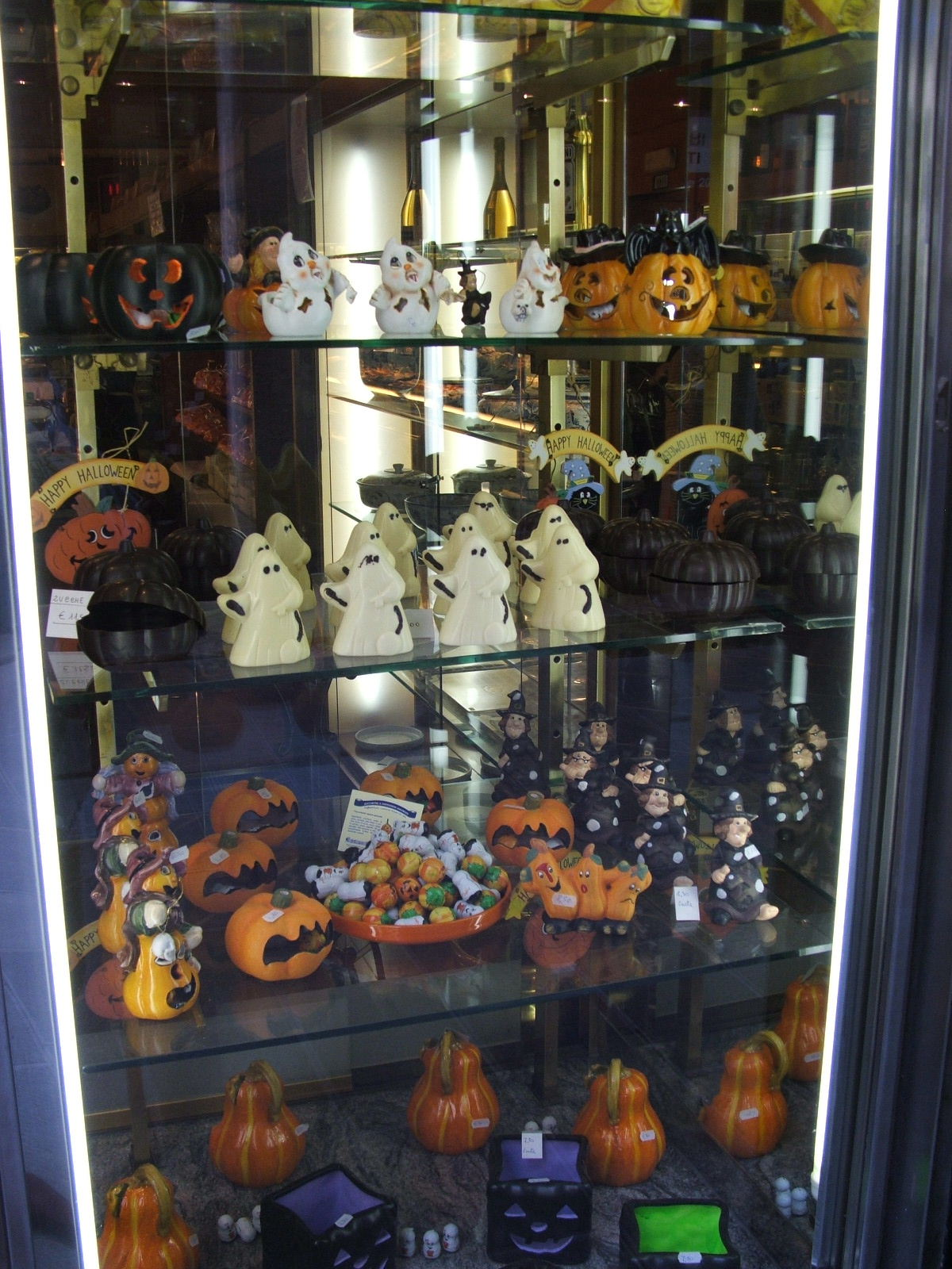 Una vetrina di pasticceria con dolcetti a forma di zucca per la festa di Halloween fotografata in via Galata a Genova - foto di Rinina25 e Twice25